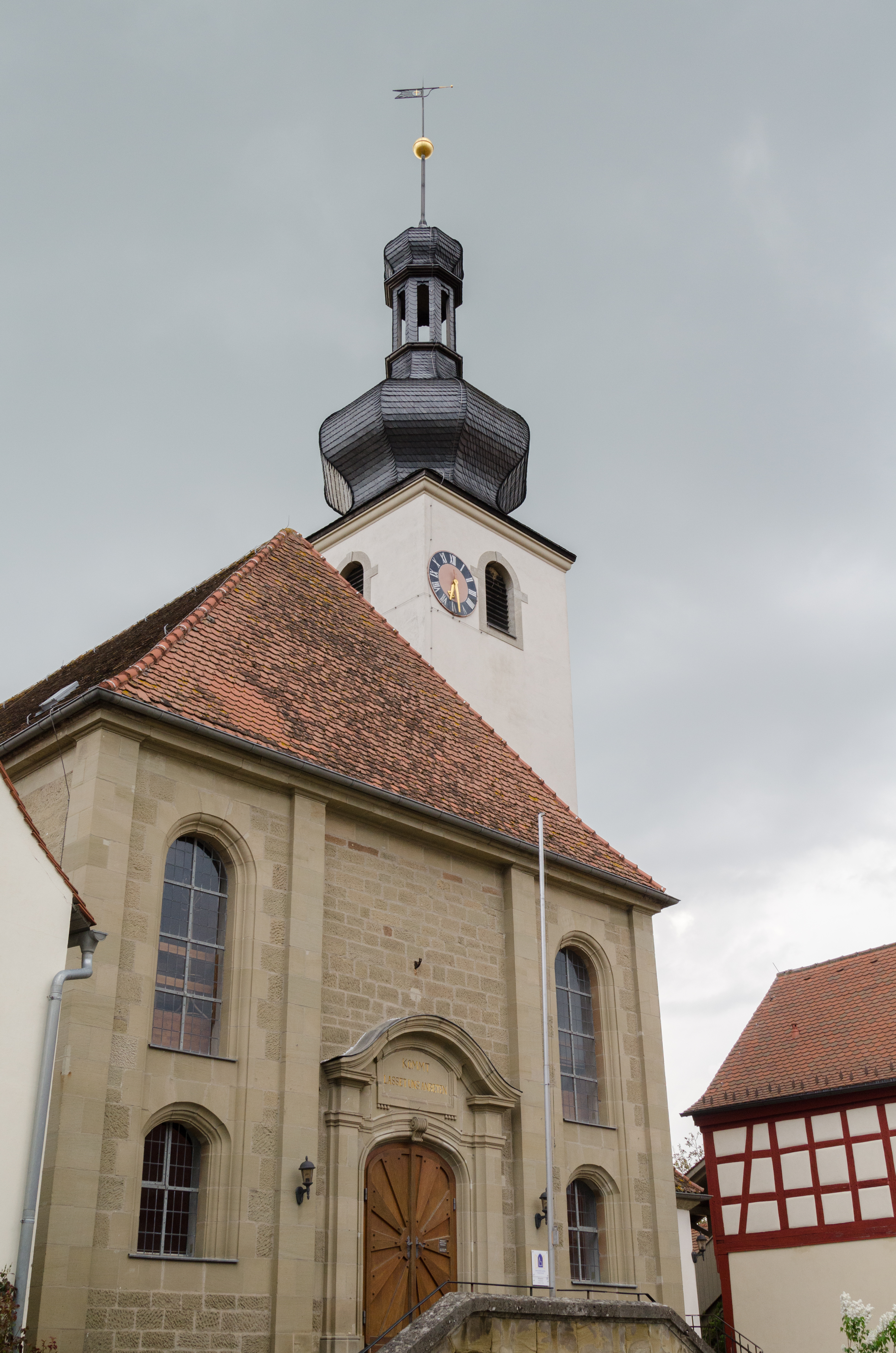 Iphofen, Nenzenheim, Evangelisch-lutherische Pfarrkirche